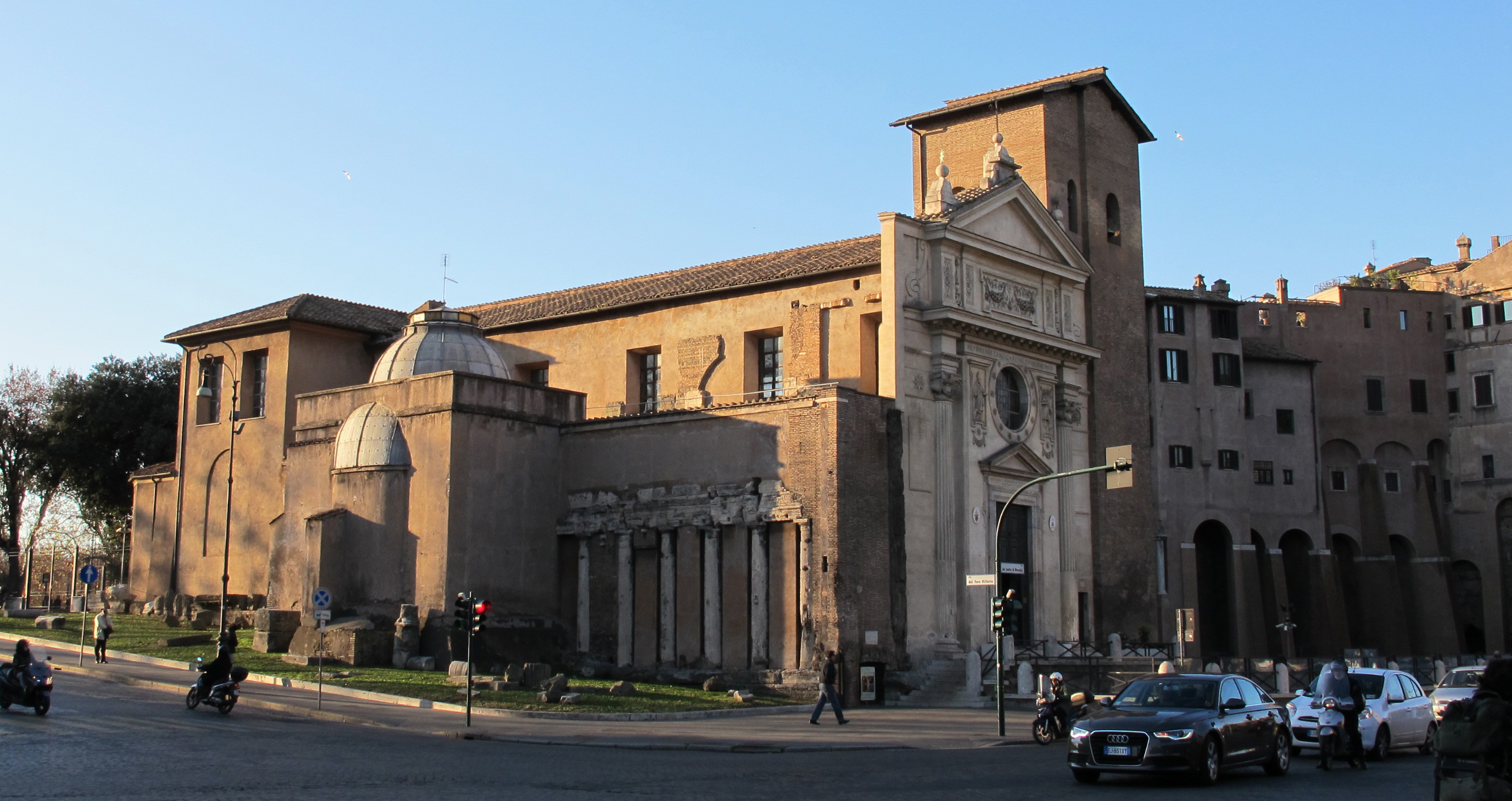 San nicola in carcere, lato esterno